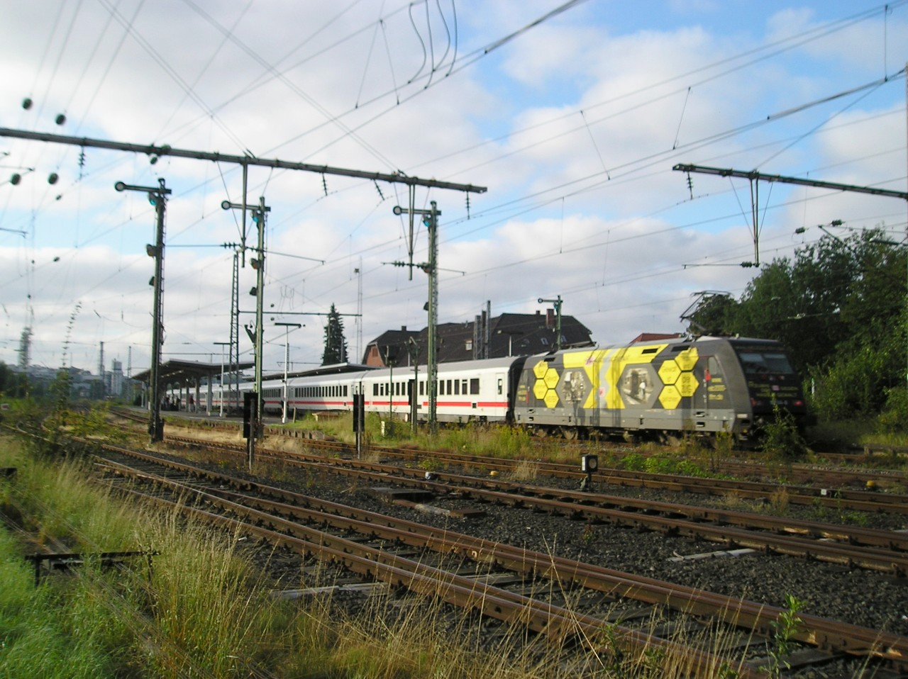 101 141-0 am 12.08.2007 mit Lr 78952 KDA - EPD in Lage (Lippe)